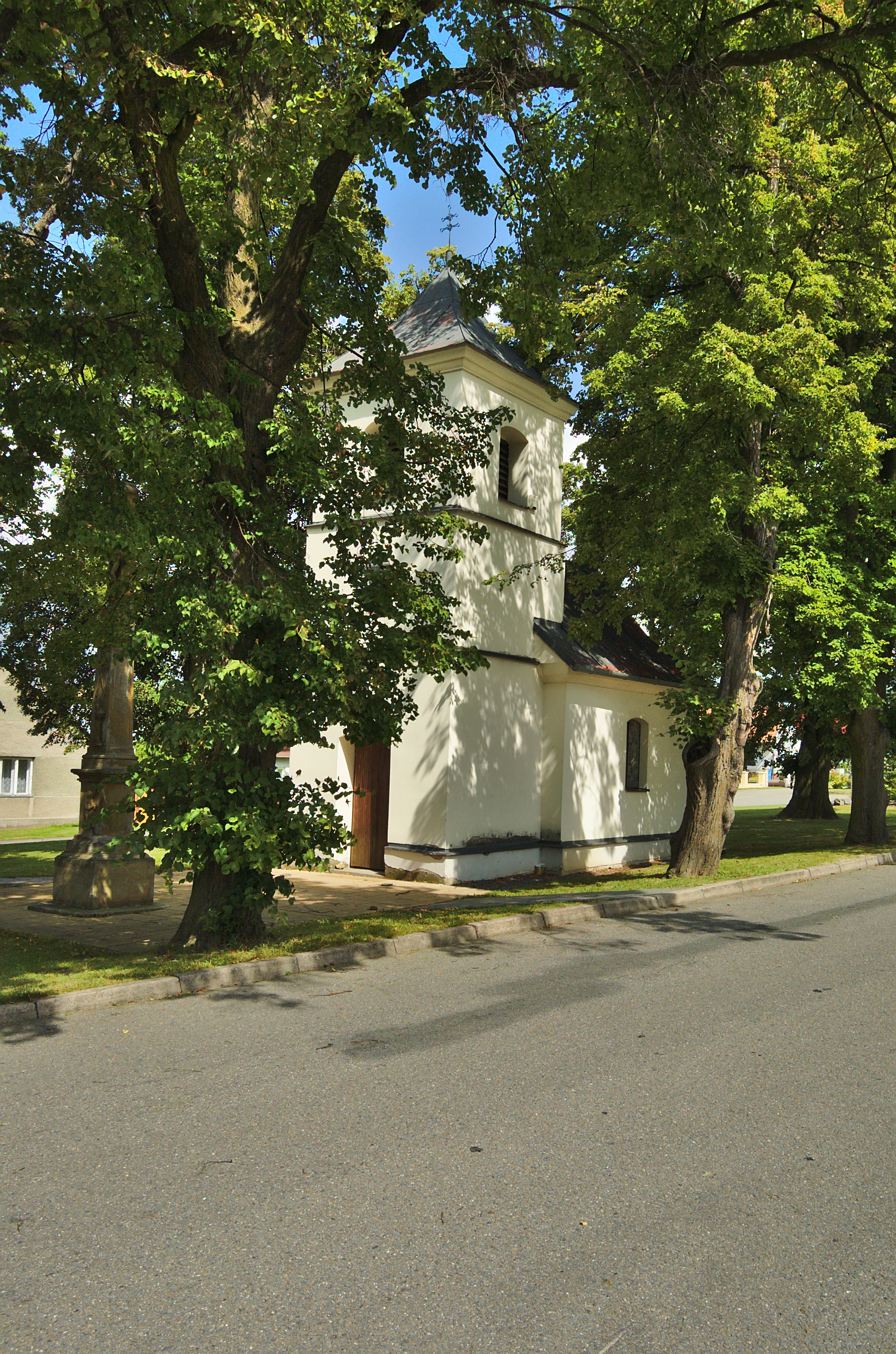 Kaplička svatého Vavřince na Hrochově, Lipová, okres Prostějov